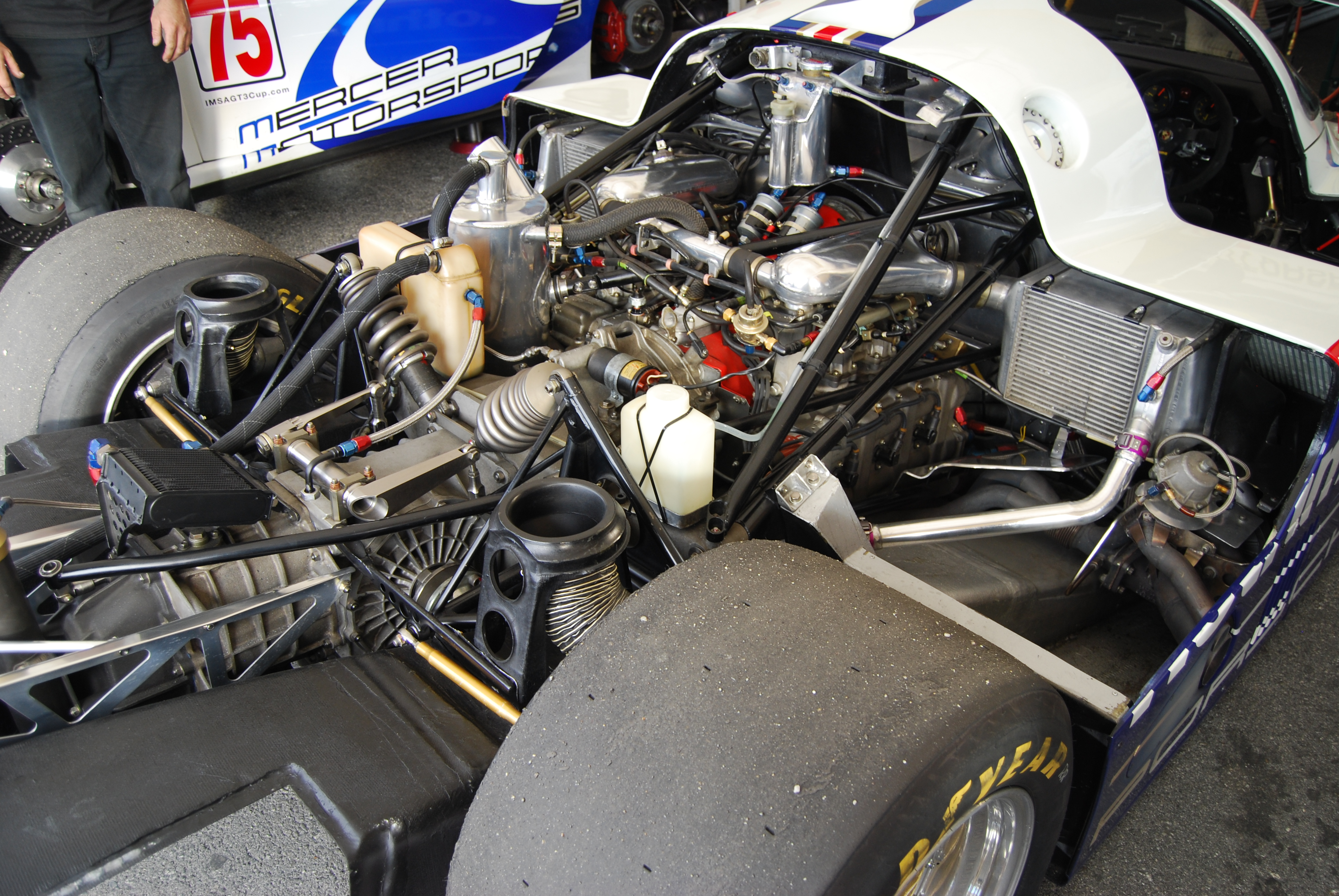 6d11_DSC_0508